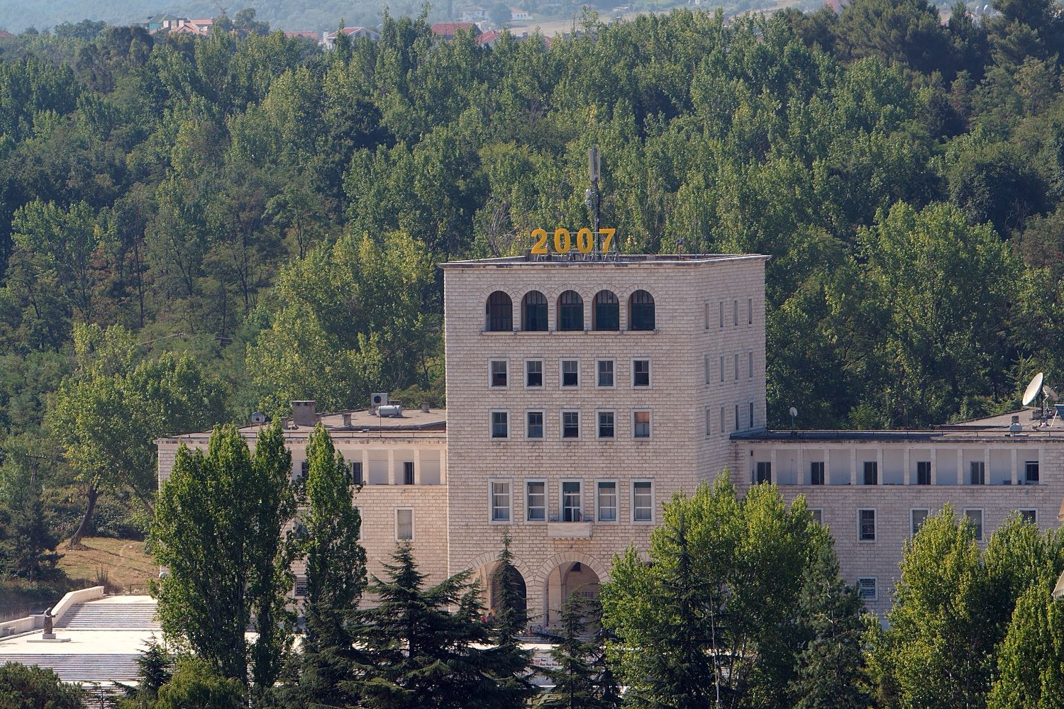 Taken in Tirana, Albania